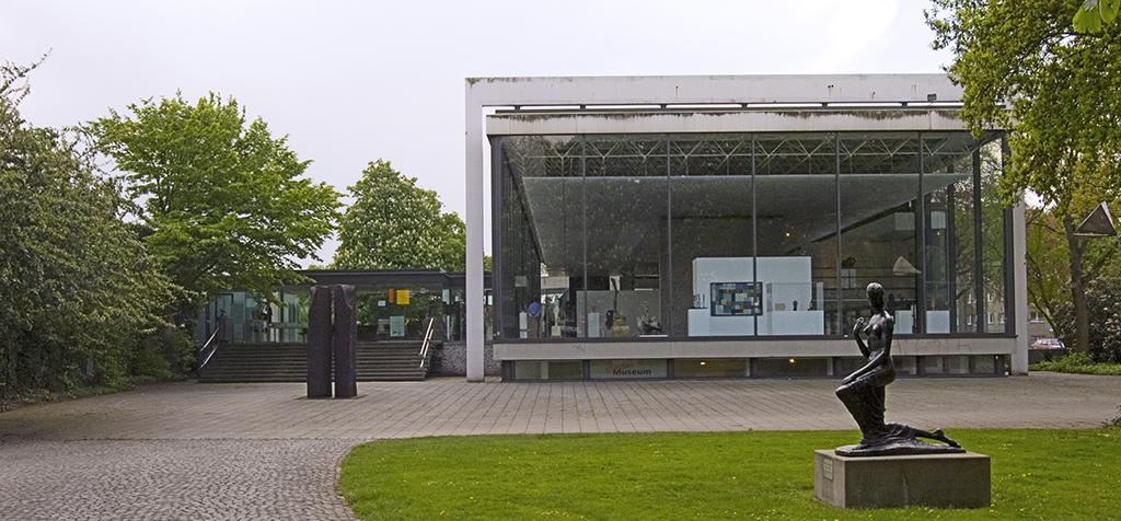 Lehmbruck-Museum, Eingang